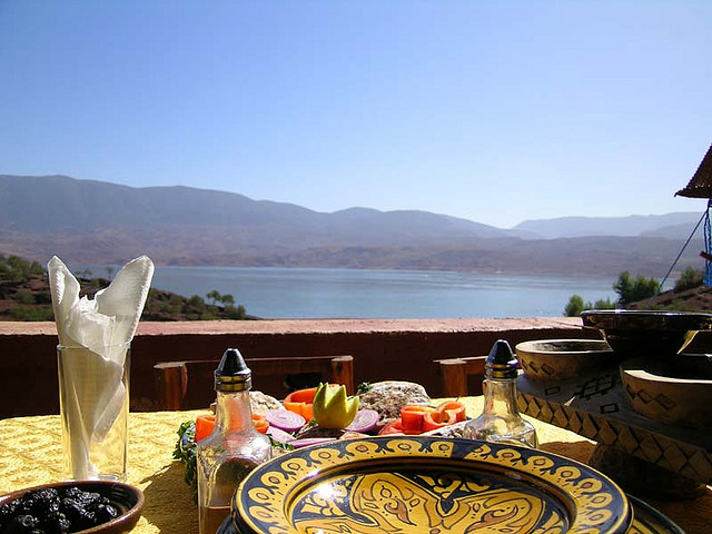 Morocco07